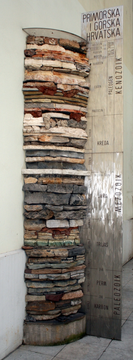 primorska i gorska Hrvatska u dvorištu Hrvatskog prirodoslovnog muzeja u Zagrebu